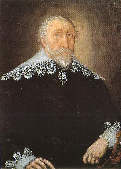 Heinrich II. Posthumus Reuß (jüngere Linie) (* 1572; † 1635), Seigneur of Gera